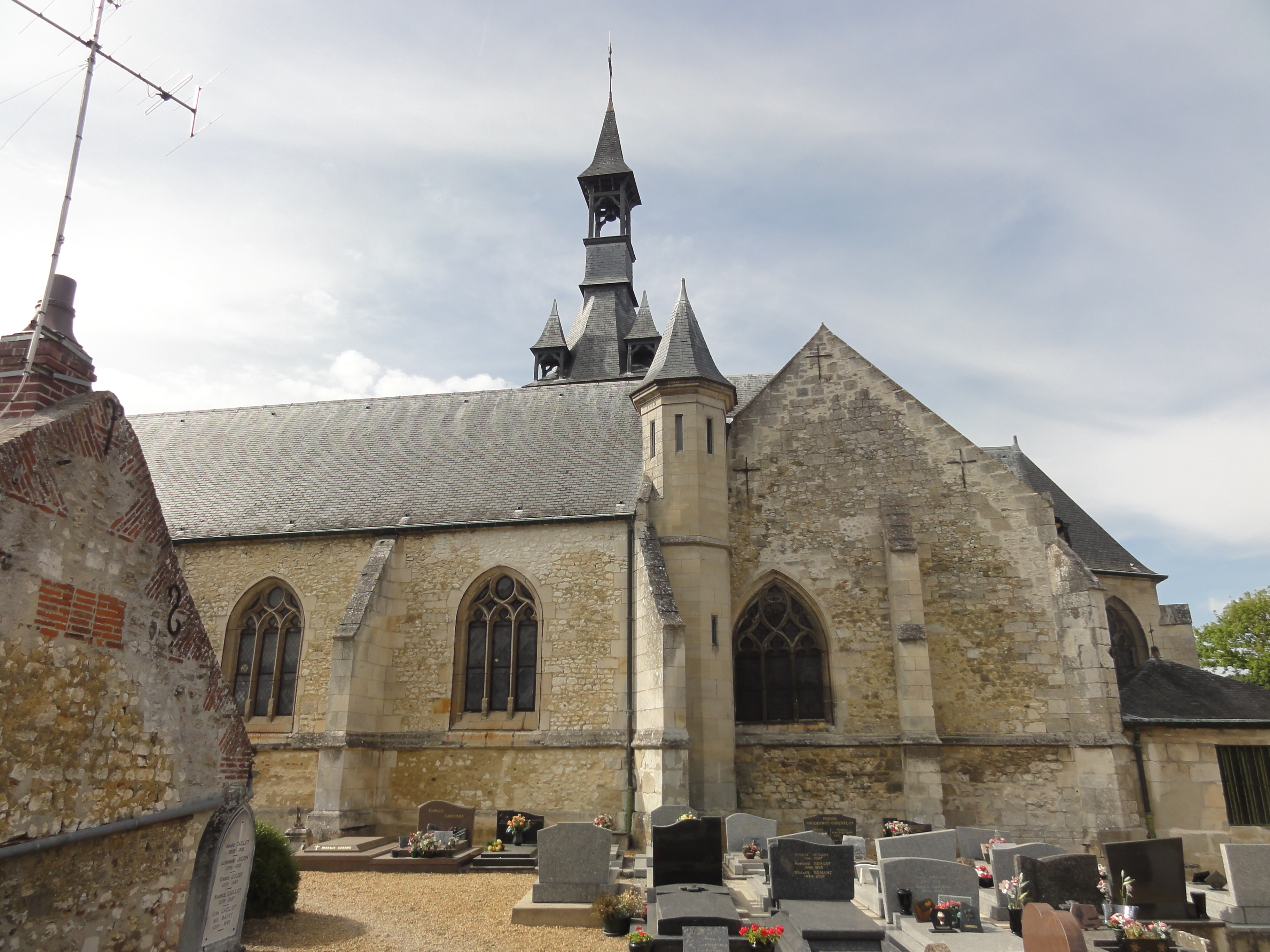 Église Saint-Pierre-et-Saint-Paul de Fitz-James (voir titre).